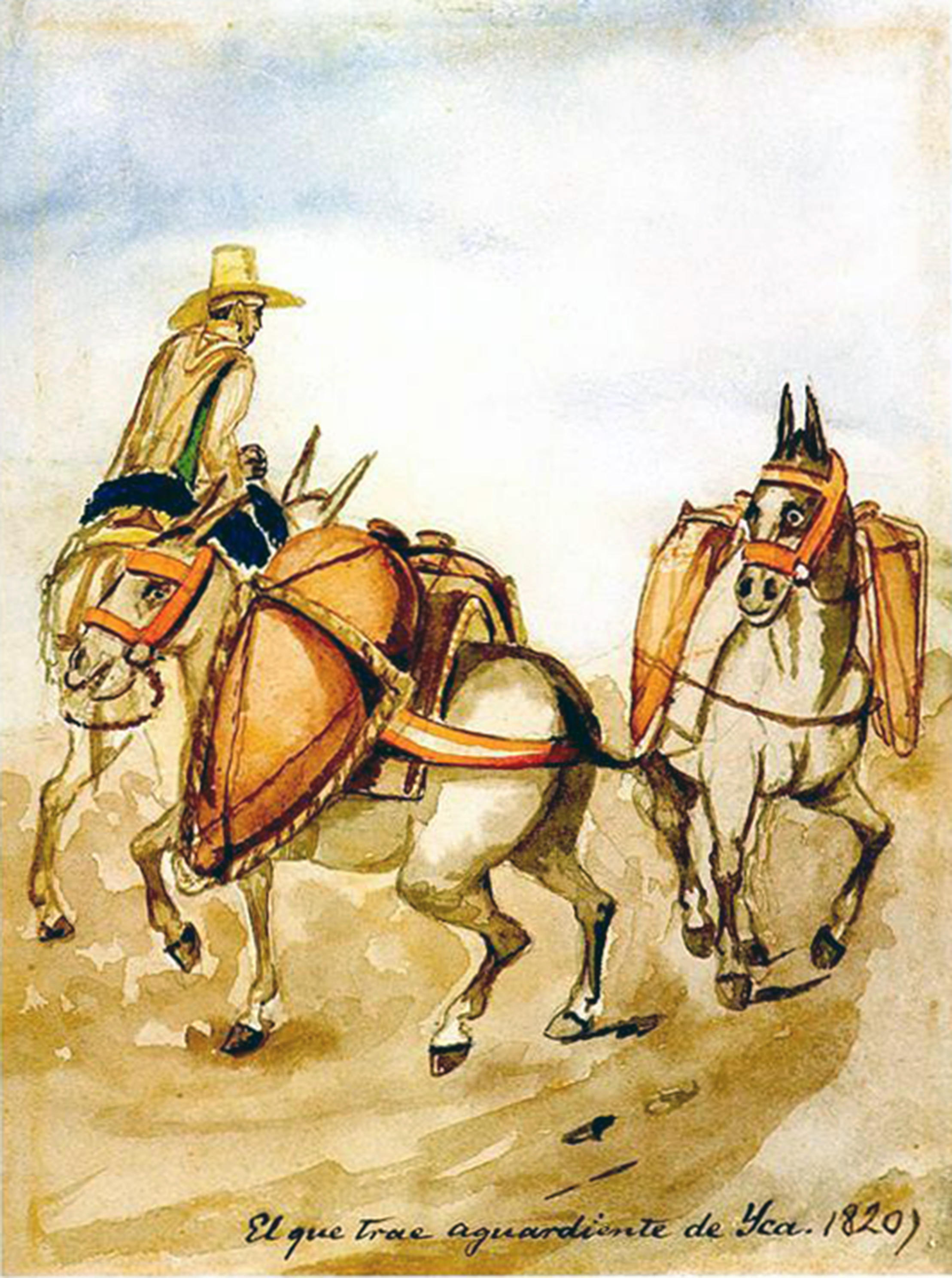 Acuarela de Pancho Fierro (Lima, 1807 - Lima, 1879)